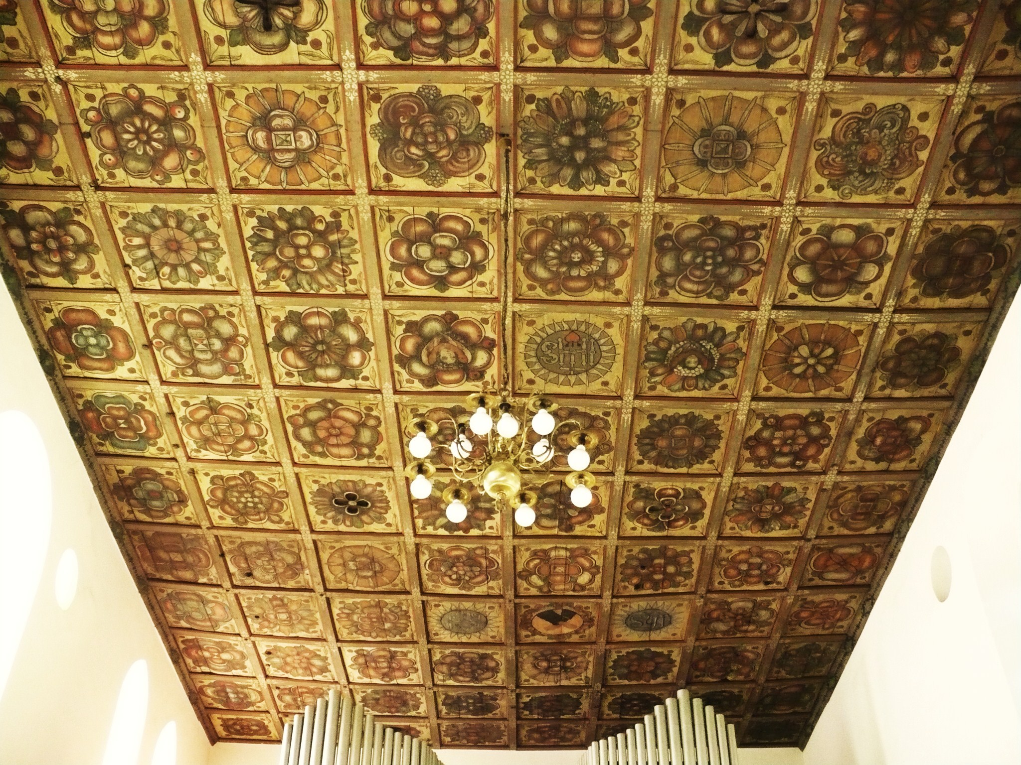 Bydgoszcz, ul. Gdańska - dawny kościół klasztorny klarysek, ob. par. p.w. MB Wniebowziętej, 1582